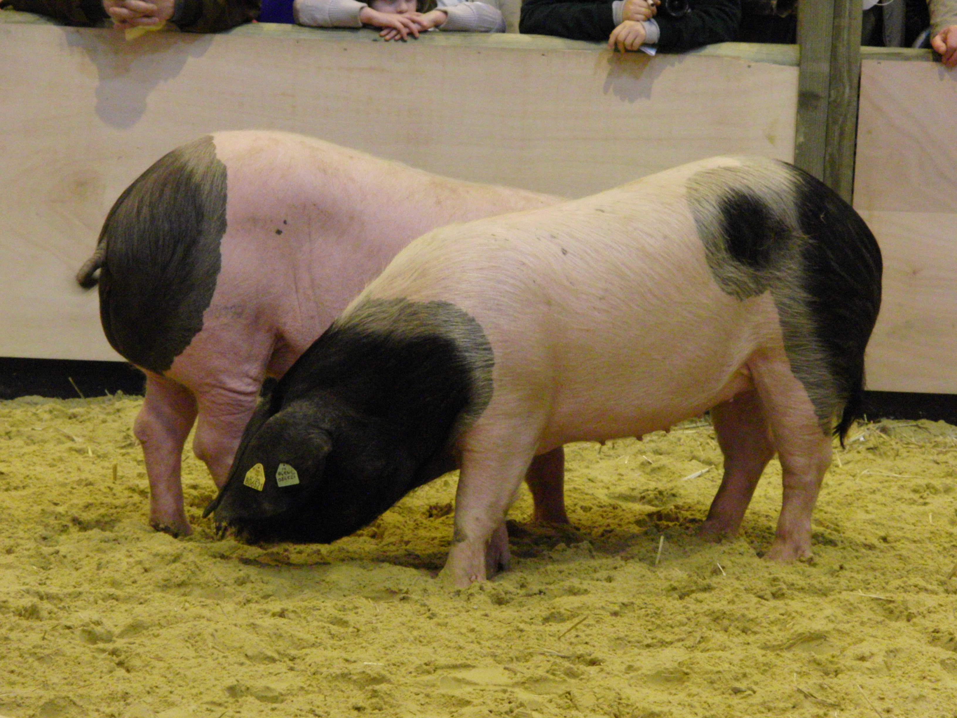 Pie noir du Pays basque - Salon de l'agriculture 2010